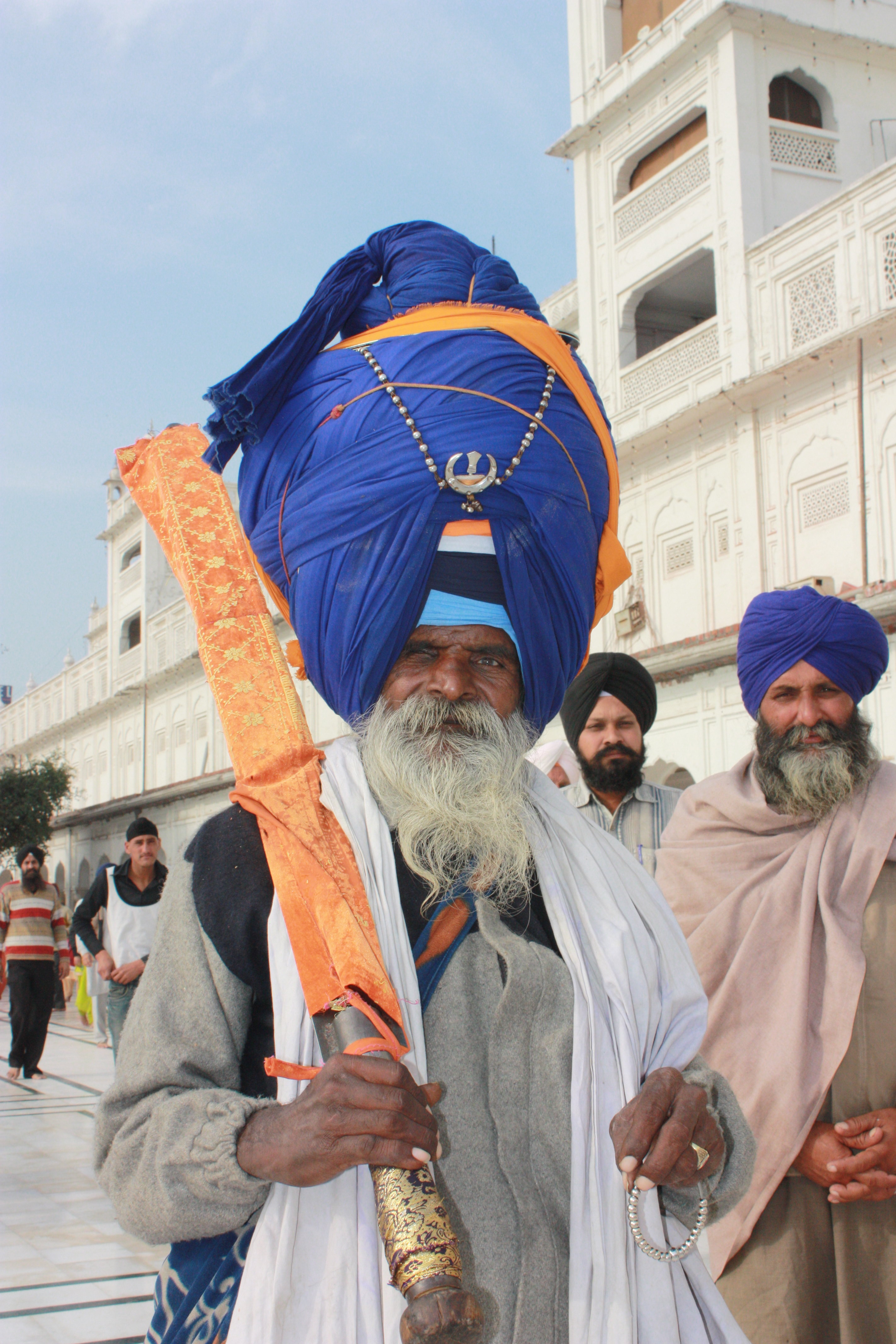 Amritsar, Golden Temple